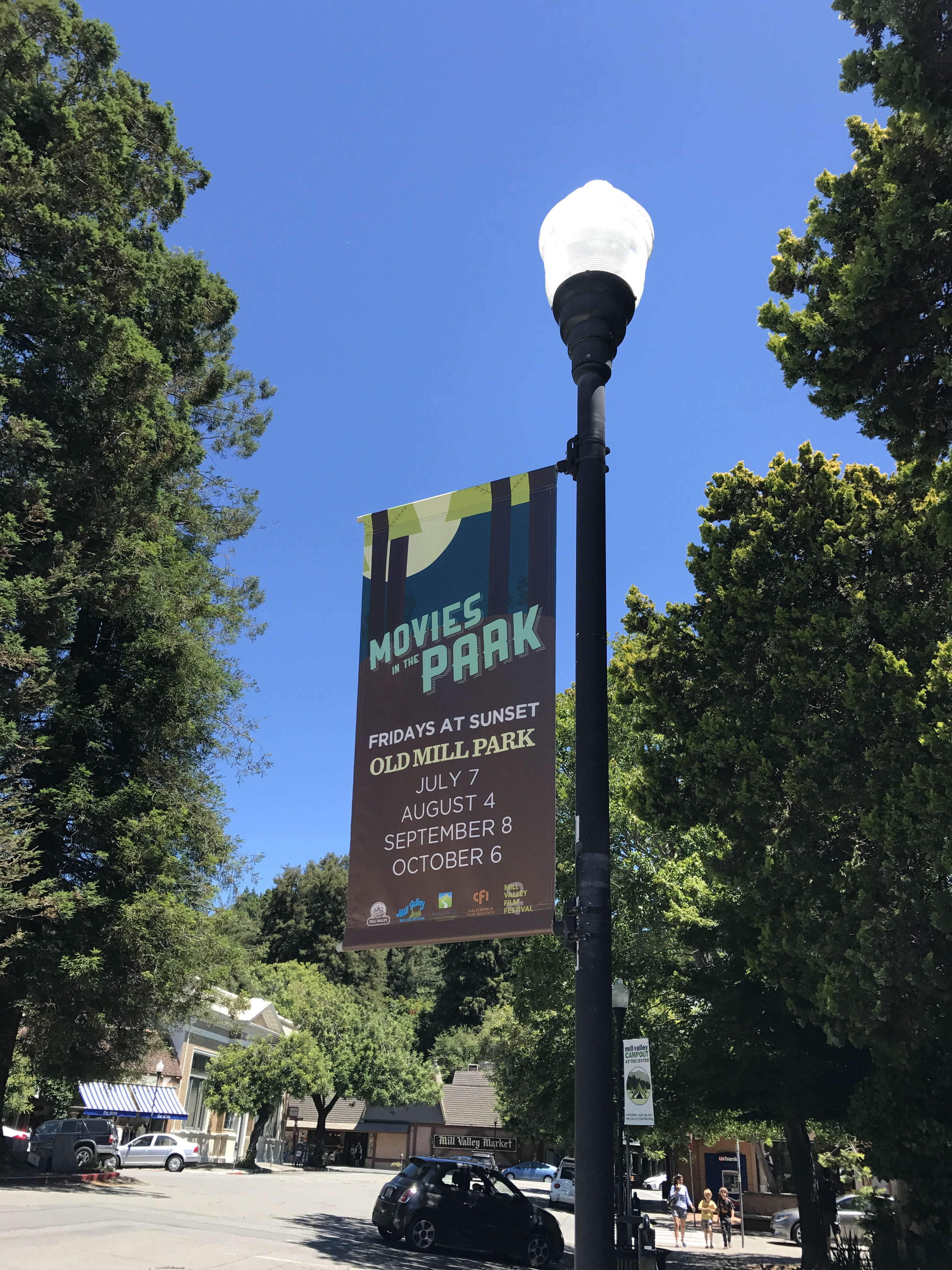 in town mill valley